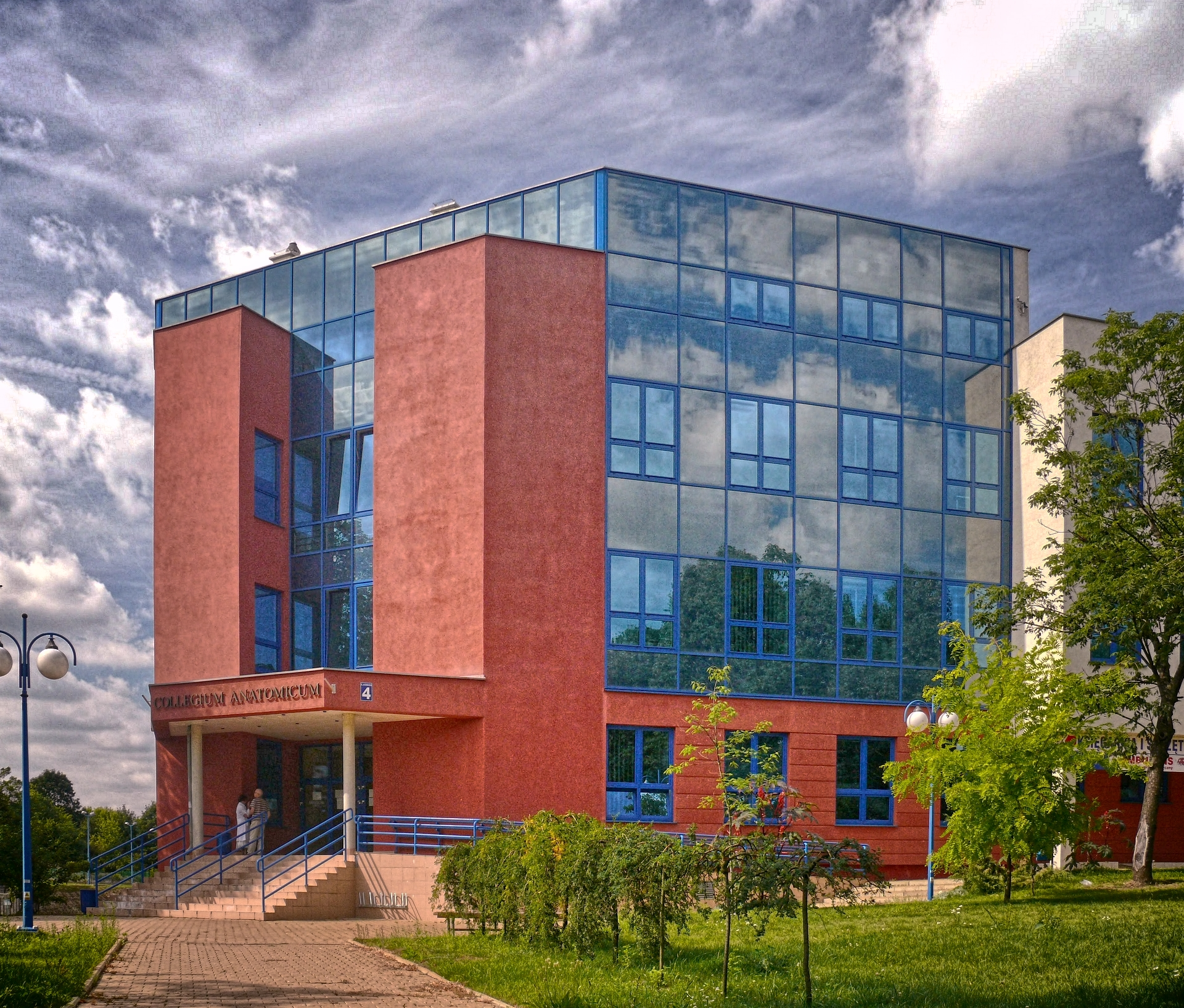 Główne wejście do nowego gmachu Collegium Anatomicum Uniwersytetu Medycznego w Lublinie, przy ul. Jaczewskiego.